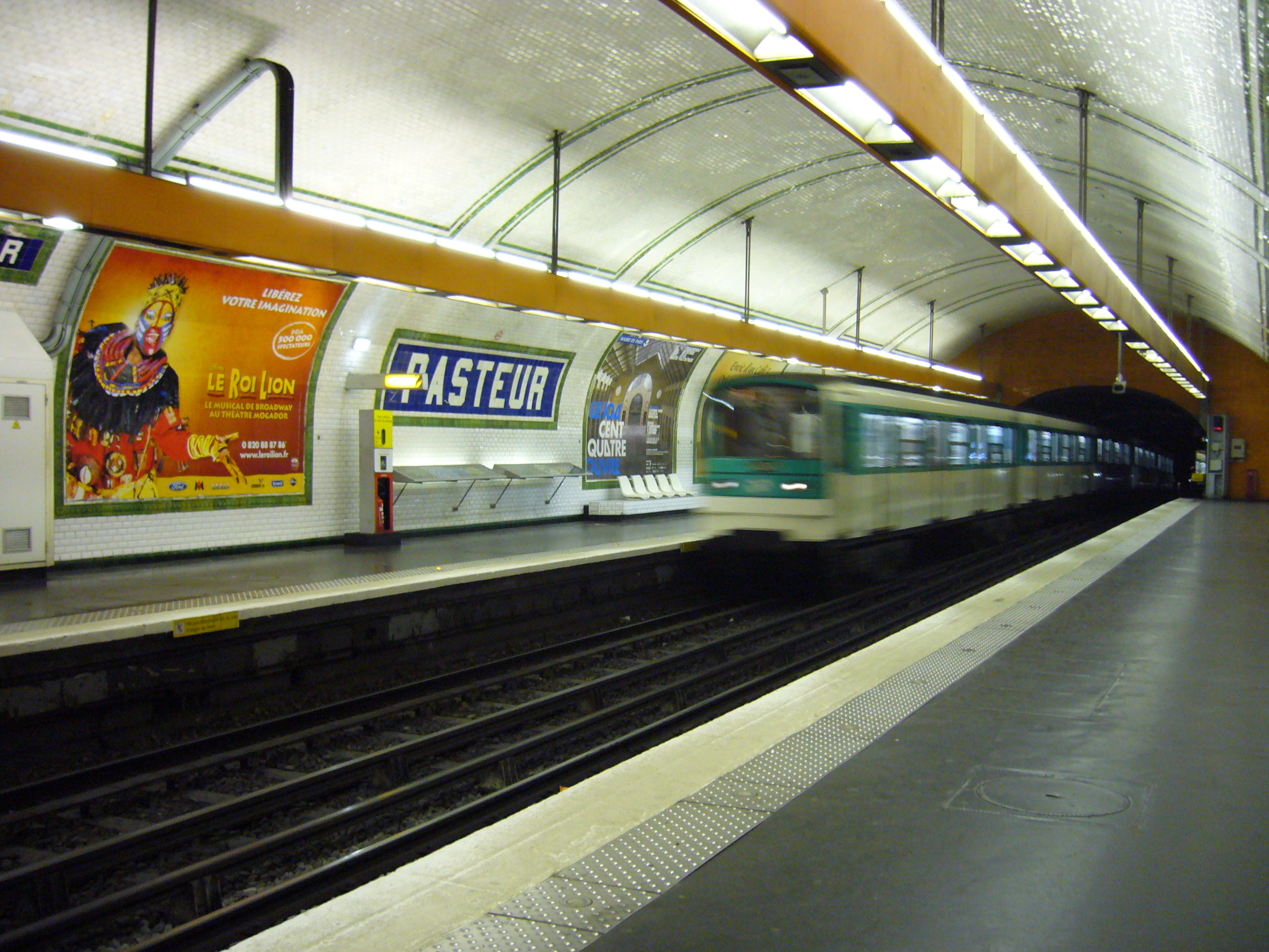 Arrivée d'un MF 67 en direction de Porte de la Chapelle à la station Pasteur de la ligne 12 du métro de Paris.